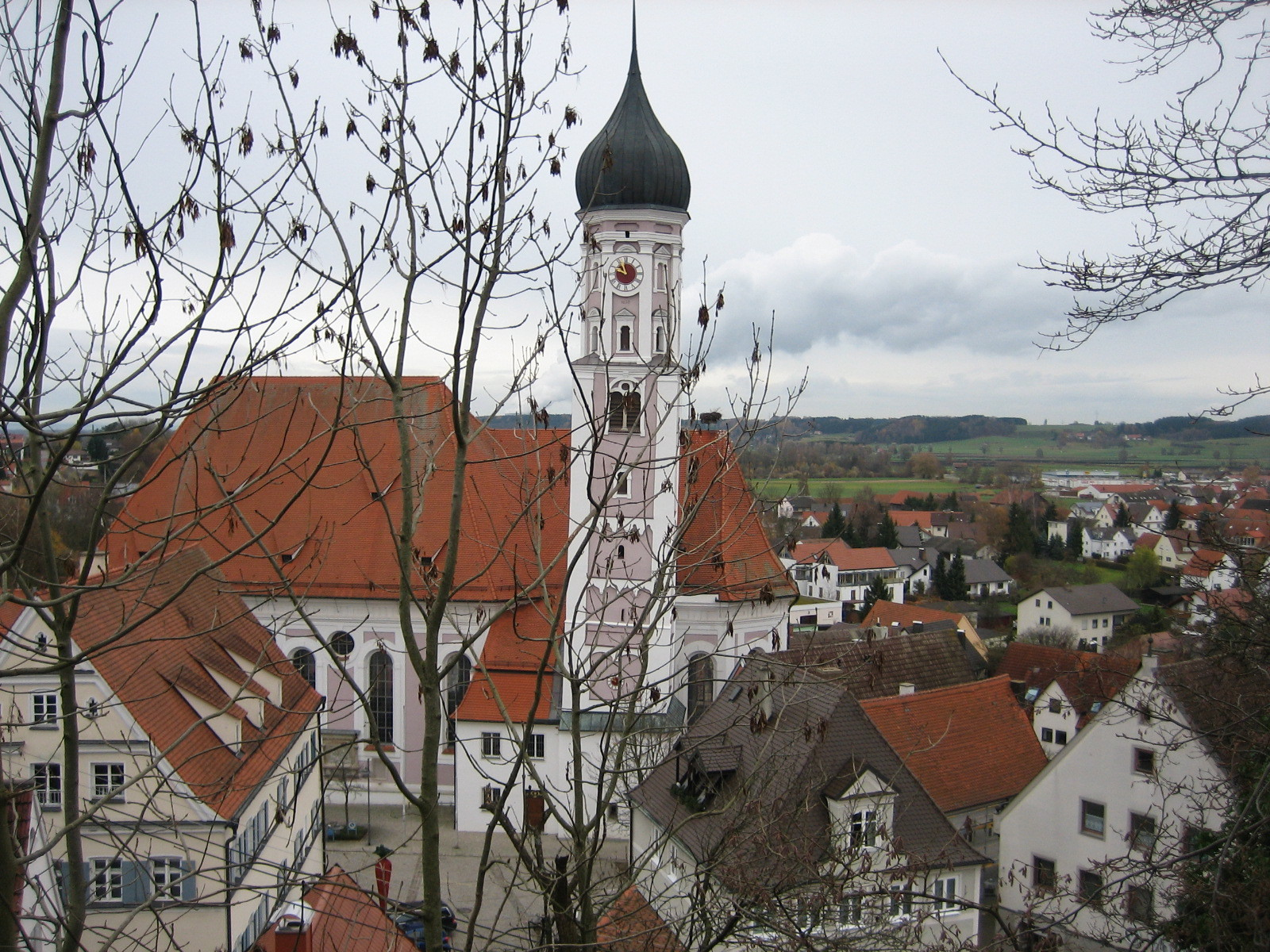 Burgau in Schwaben, Blick auf die Stadtpfarrkirche vom Schloss aus